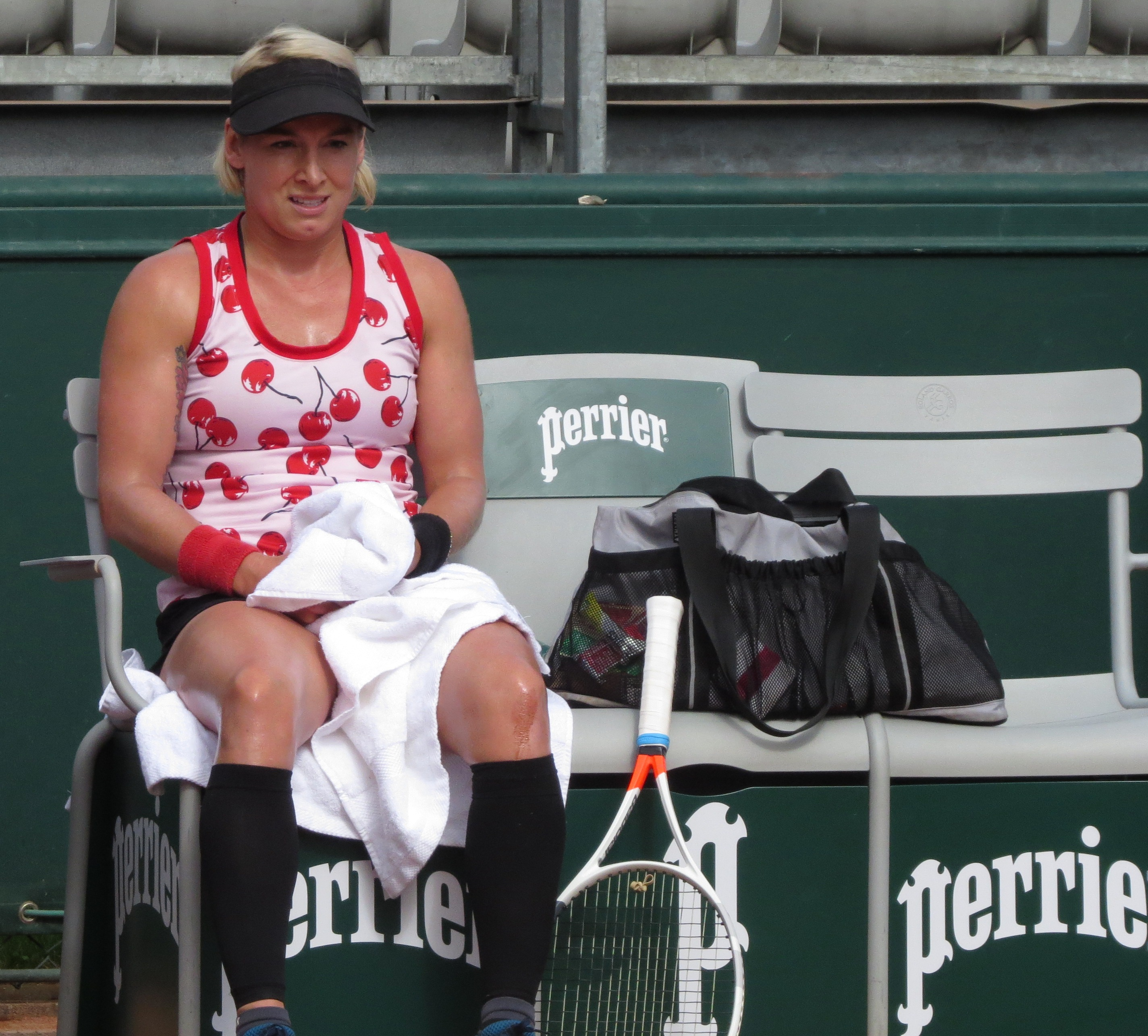 Bethanie Mattek-Sands lors de son premier tour des qualifications face à Jasmine Paolini (court n°14)